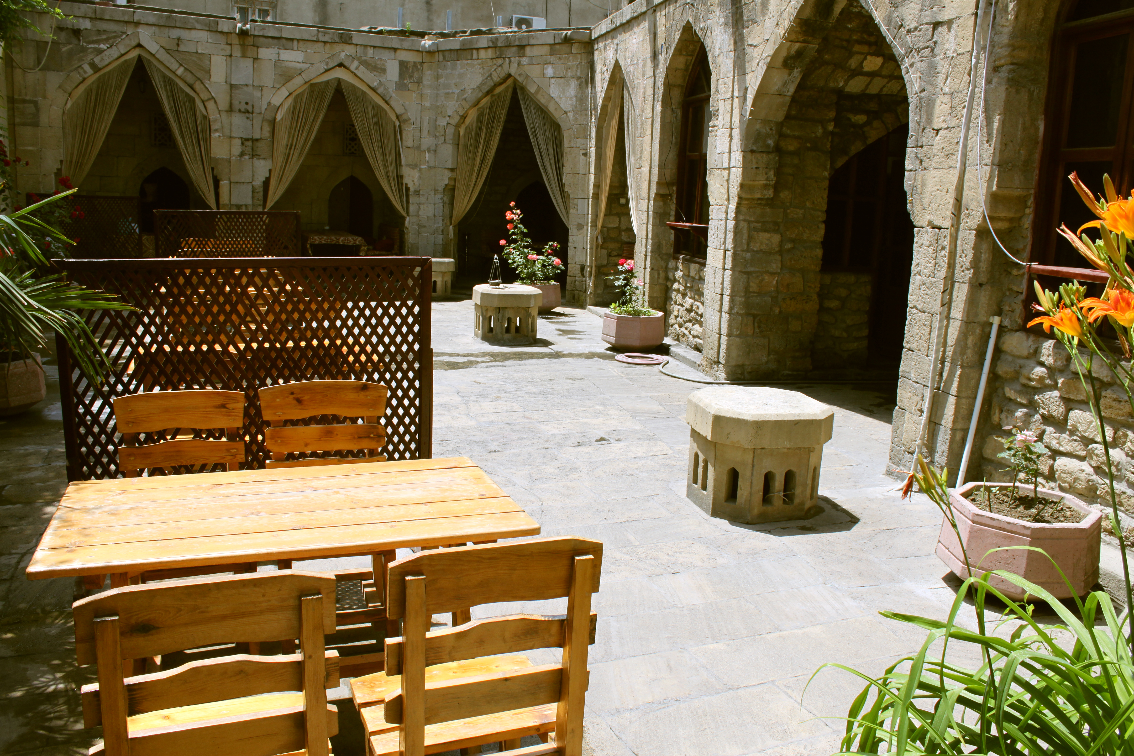 Buxara karvansarası